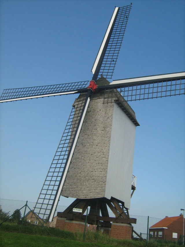 De Kruisekemolen in Wervik.